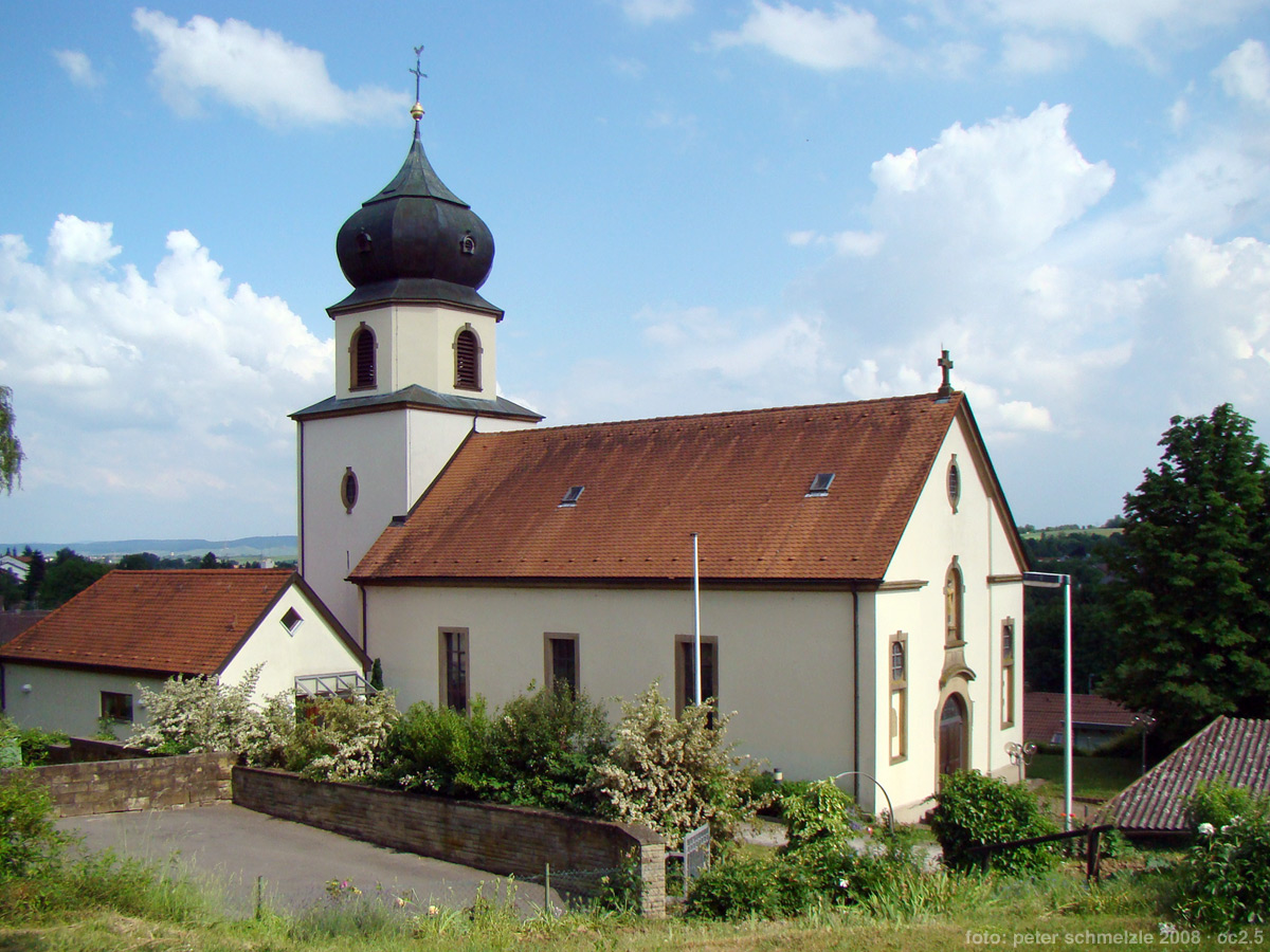 Katholische Pankratiuskirche in Leingarten